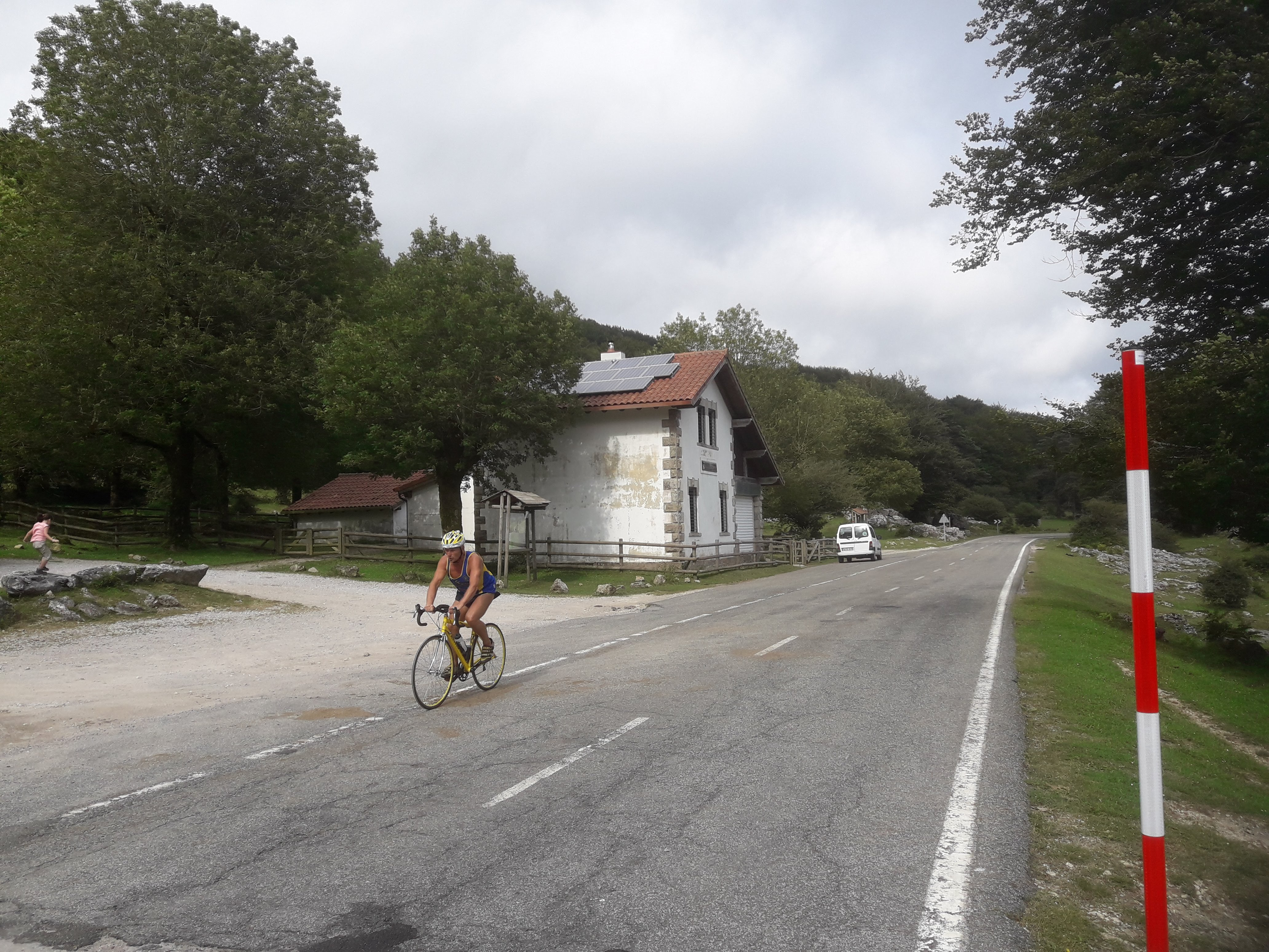 Carretera del coll d'Urbasa, NA-718.